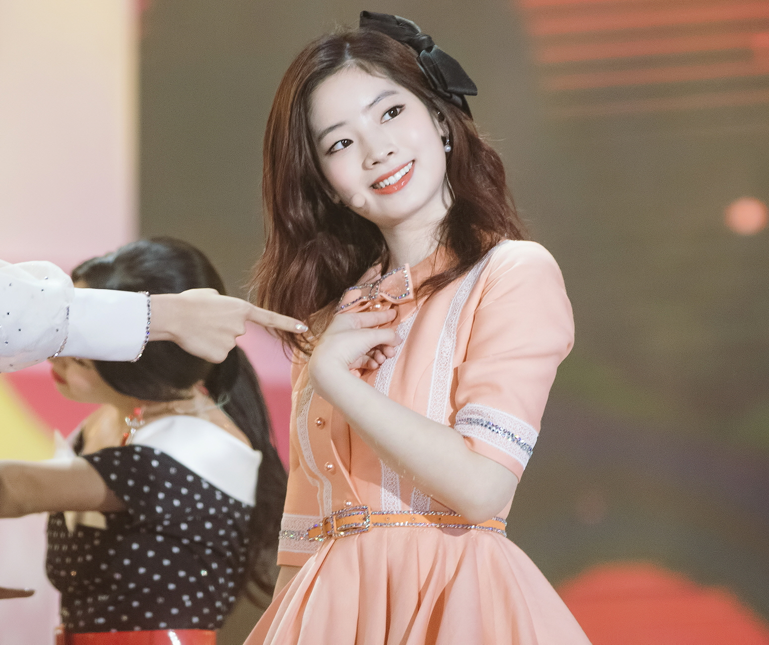 171202 멜론뮤직어워드 트와이스